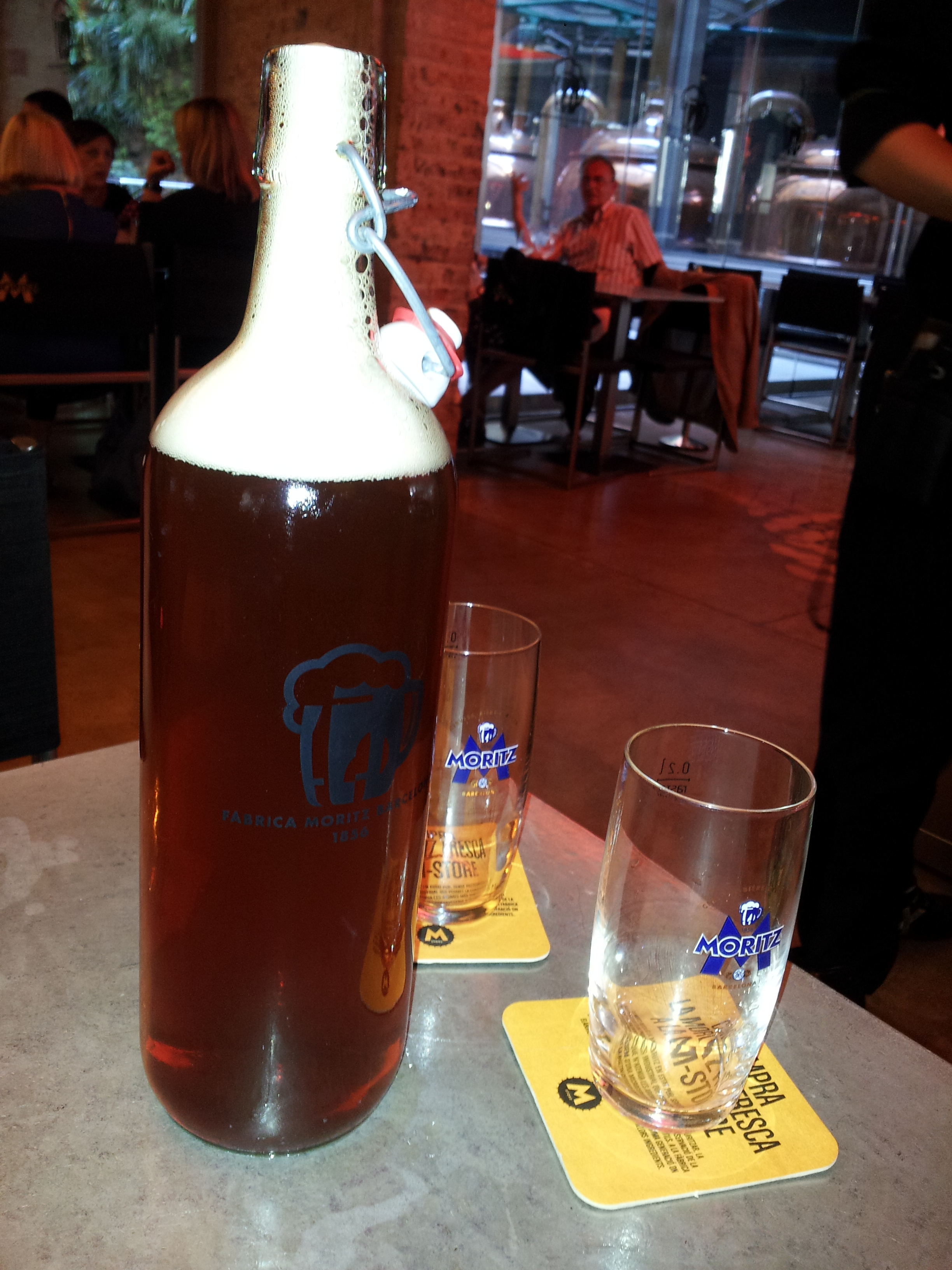 Cervesa Epidor Moritz sense pasteuritzar a la Fàbrica Moritz de Barcelona (Ronda de Sant Antoni, 39-41).